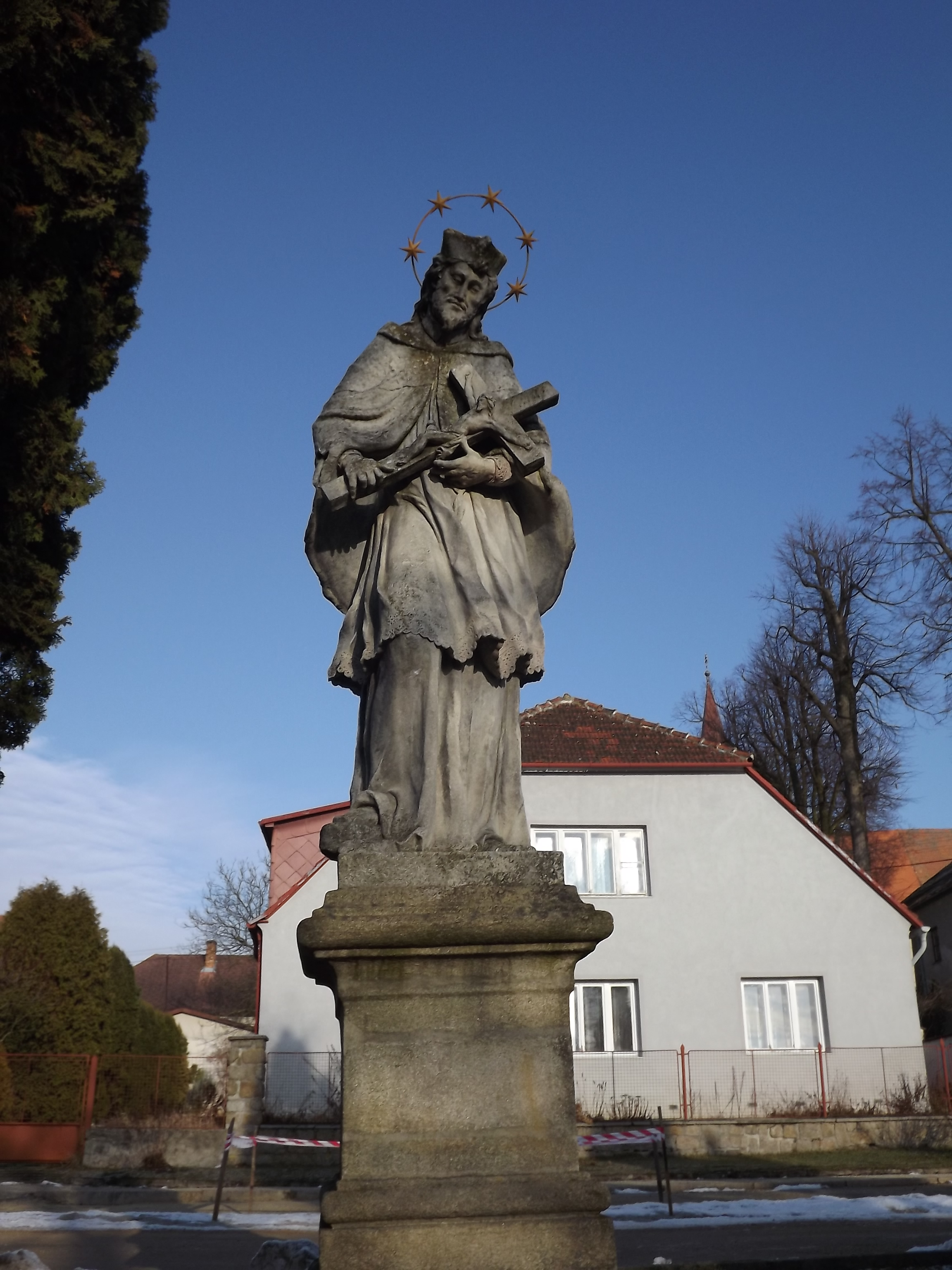 Socha sv. Jana Nepomuckého (Staré Hobzí), náves, Staré Hobzí